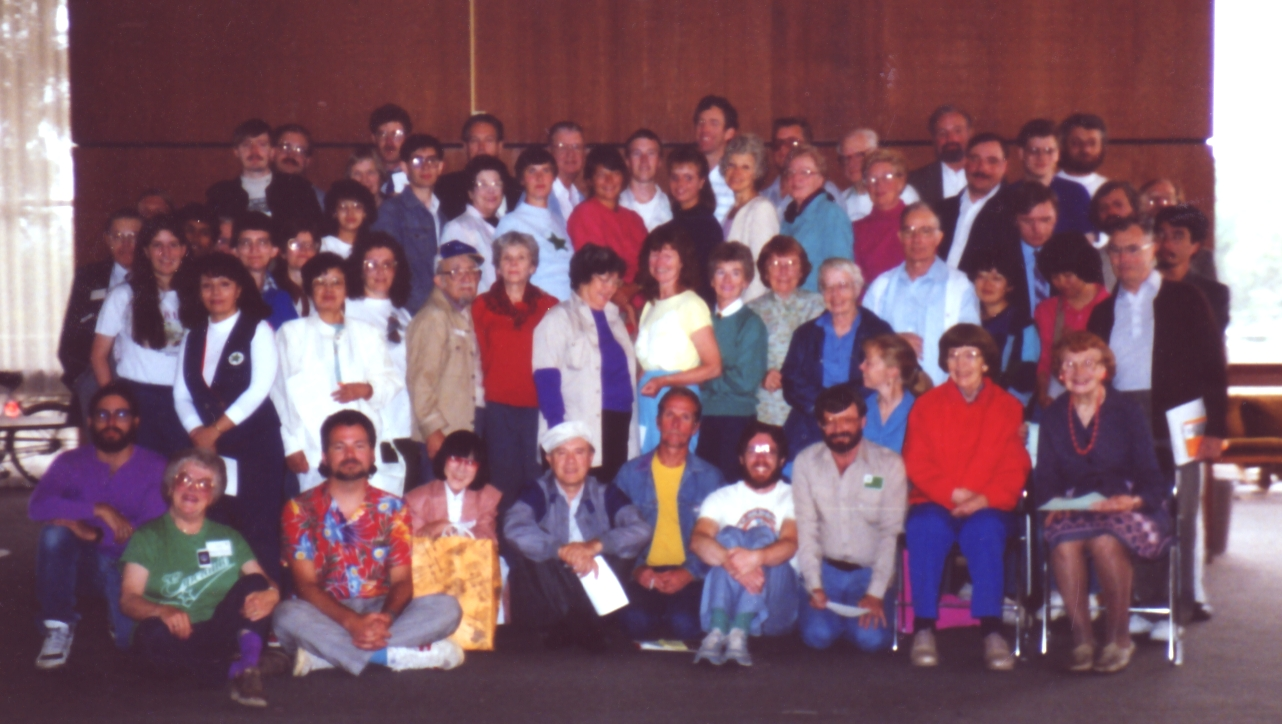 iuj partoprenantoj de la Nord-Amerika Somera Kursaro ĉe SFŜU en 1990 (i.a. sur seĝo dekstre Cathy Schulze, centre en la 2-a vico de supre Birgit Pusch (ekde 1999 Birgit Prien), sube sidante 3-a de maldekstre Mike Sloper, 7-a de maldekstre Derek Roff)